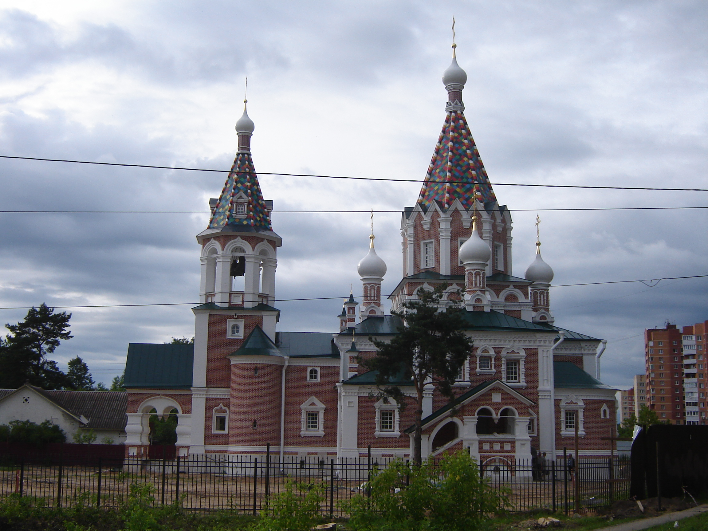 Храм Всемилостивого спаса в микрорайоне ДЗФС города Дмитрова